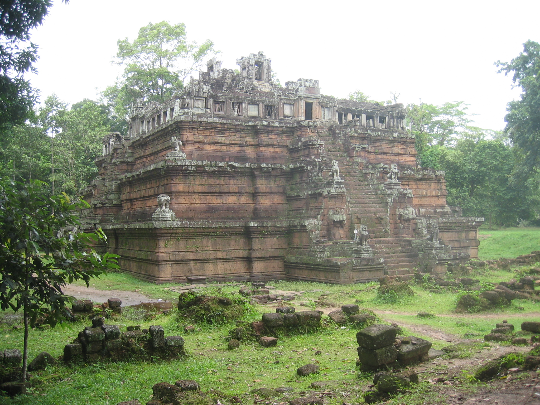 Phimeanakas